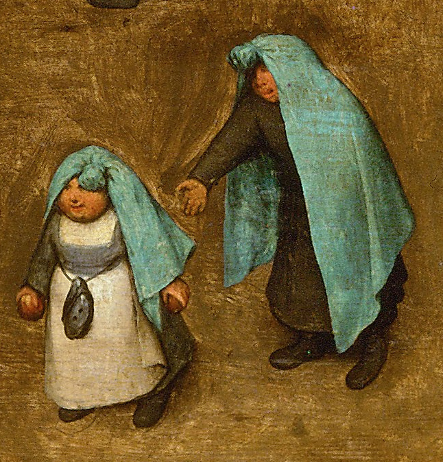 Der blaue Mantel. Detail aus Die Kinderspiele